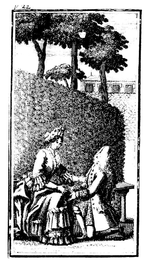 Adamantes, Die wohlprobirte Treue (Franckfurt/ Leipzig, 1716), Kupfer zu Seite 22. Die wohlprobirte Treue in einer kurtzen Helden-und Liebes-Geschichte/ vorgestellt von ADAMANTES, [line of typographical ornaments] Franckfurt und Leipzig/ 1716